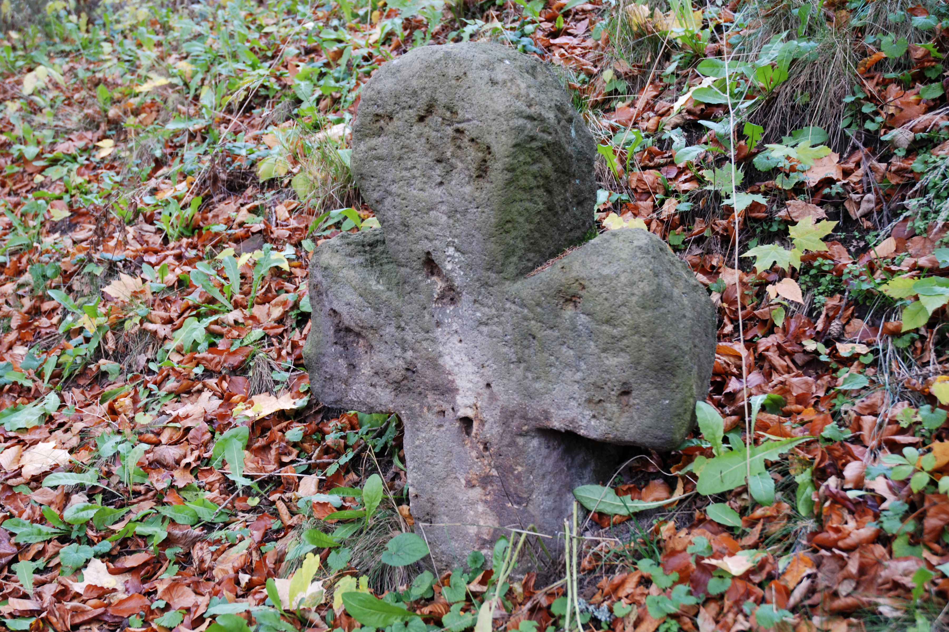 Smírčí kříž na pozemku hotelu Bellevue v Karlových Varech